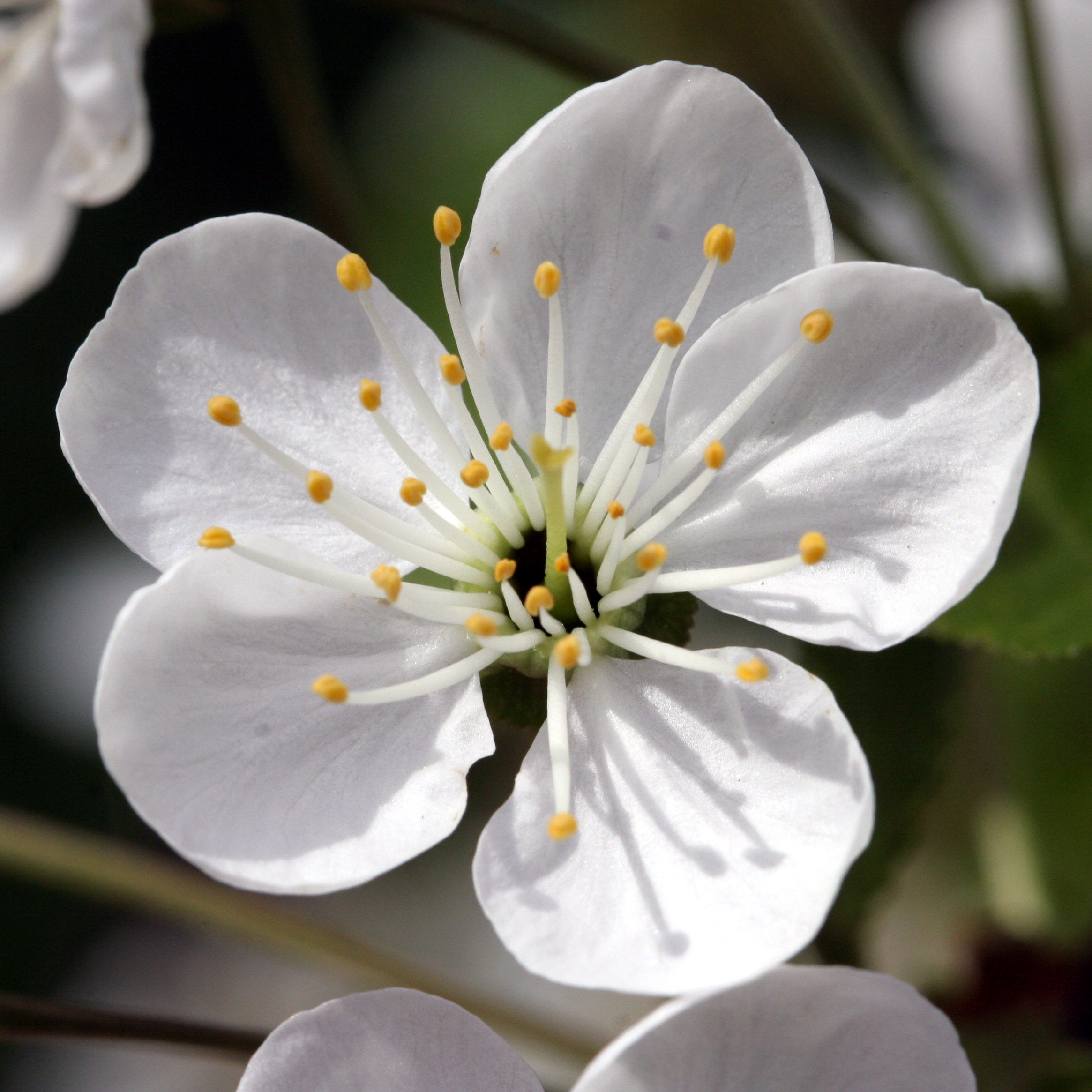 Blüte eines Schattenmorellen-Kirschbaumes. Standort: Bensheim (Südhessen)